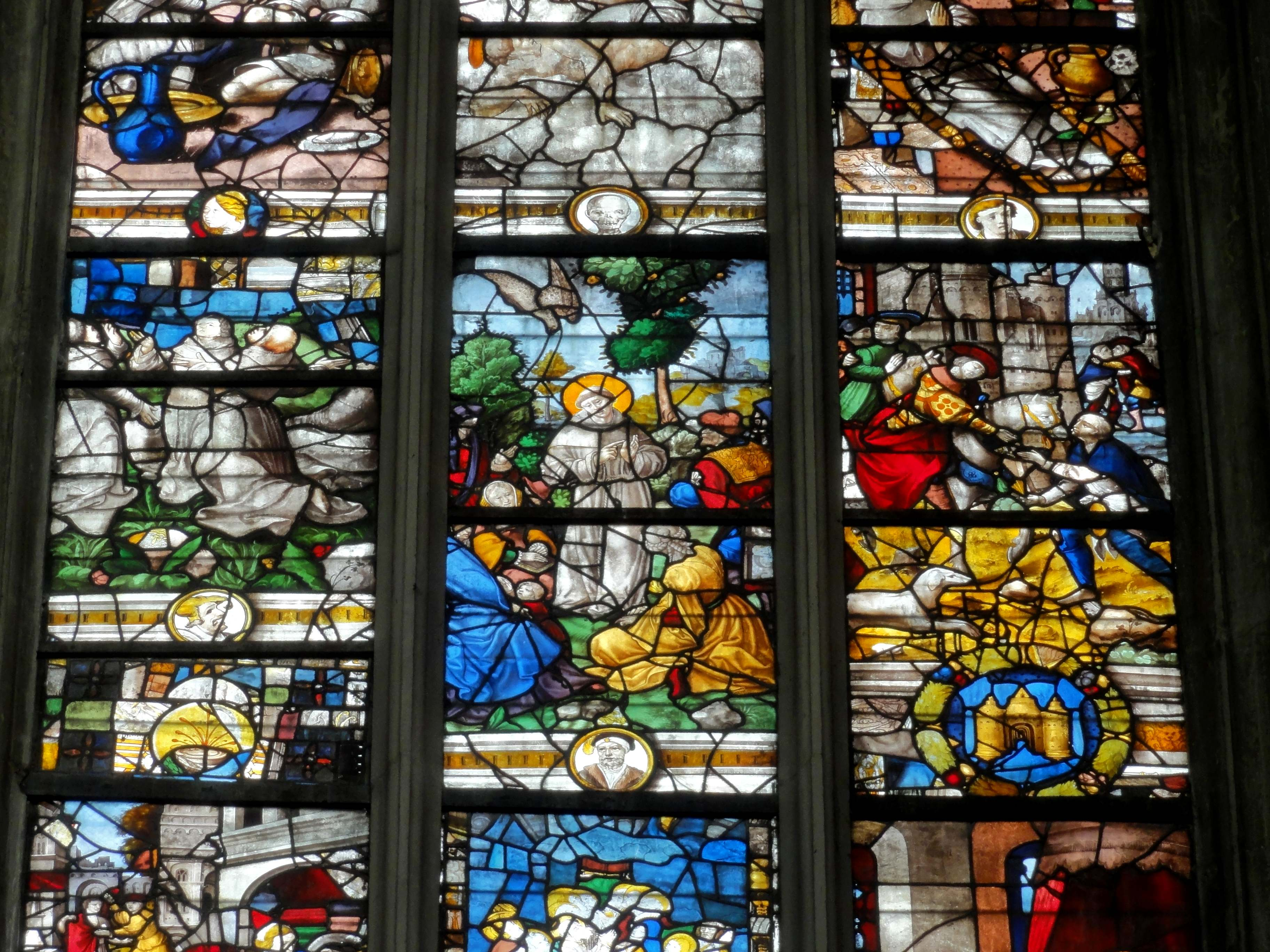 Vaisseau central, 5e travée côté nord - vitrail de la vie de saint François d'Assise.